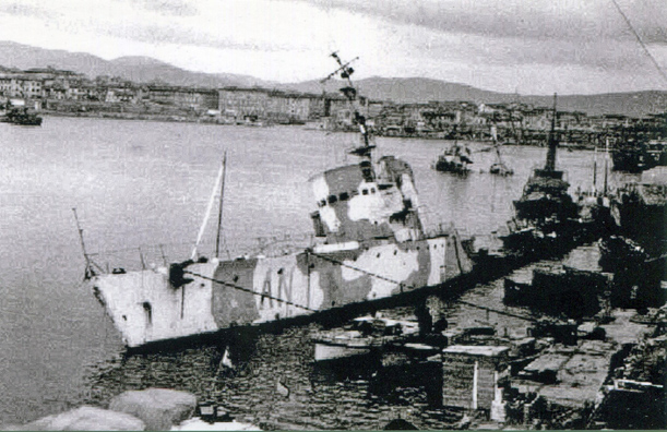 La torpediniera Antares semiaffondata nel porto di Livorno Collezione di provenienza: MAURIZIO BRESCIA dalla collezione di E. BAGNASCO